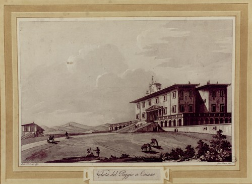 Veduta della villa di Poggio a Caiano intorno al 1800-1801